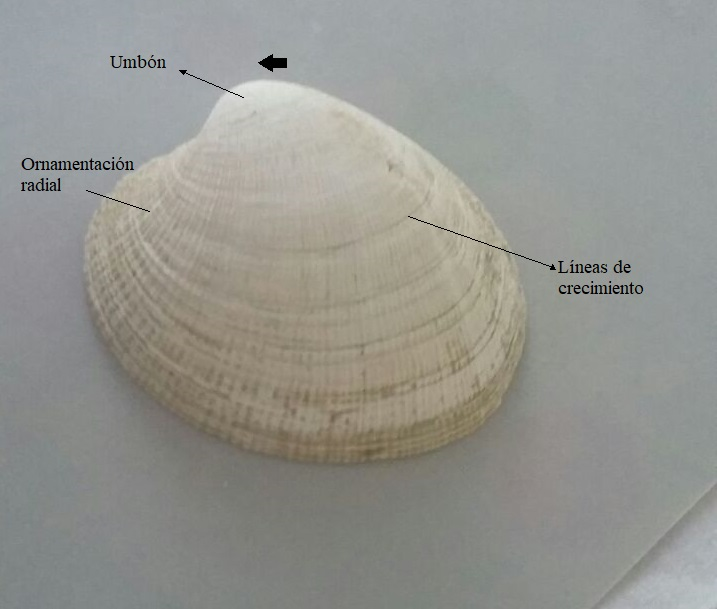 Caracteristicas externas de bivalvo heterodonto.